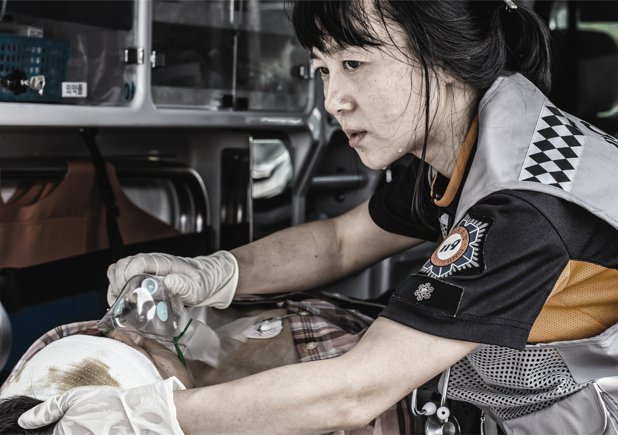 2013년 9월 세종소방 소방공무원 김현숙